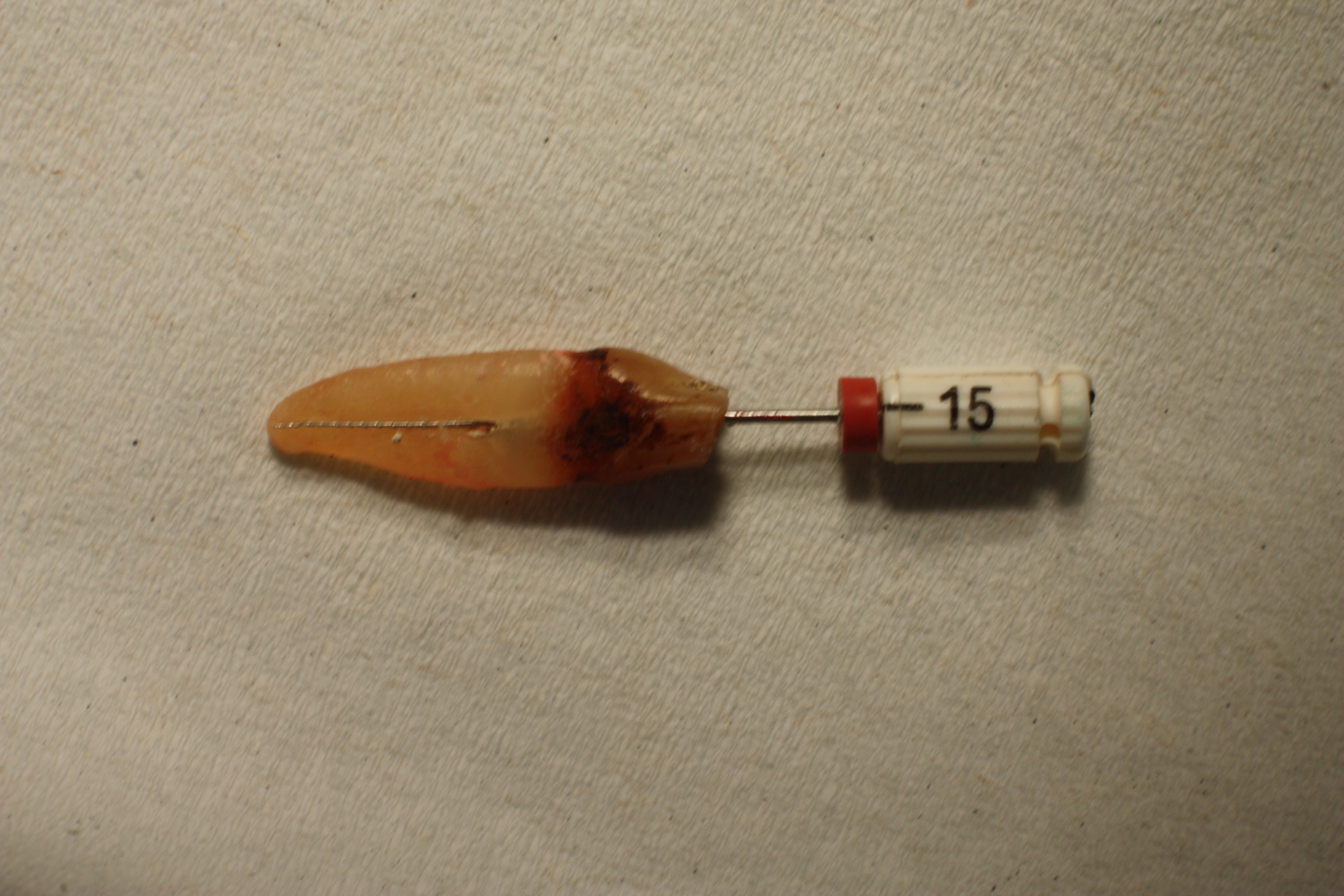 Via falsa unterer Frontzahn